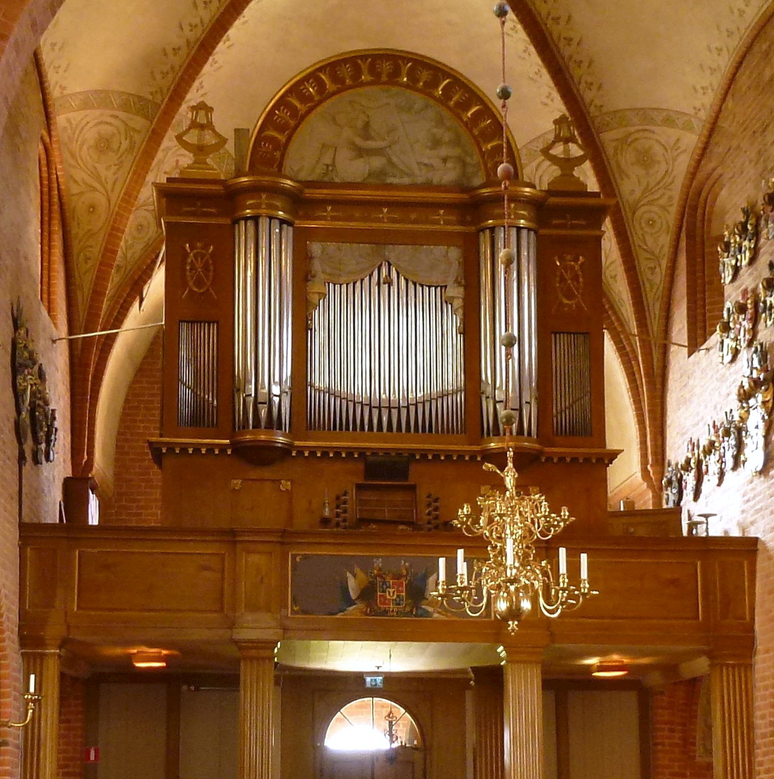 Skoklosters kyrka orgel